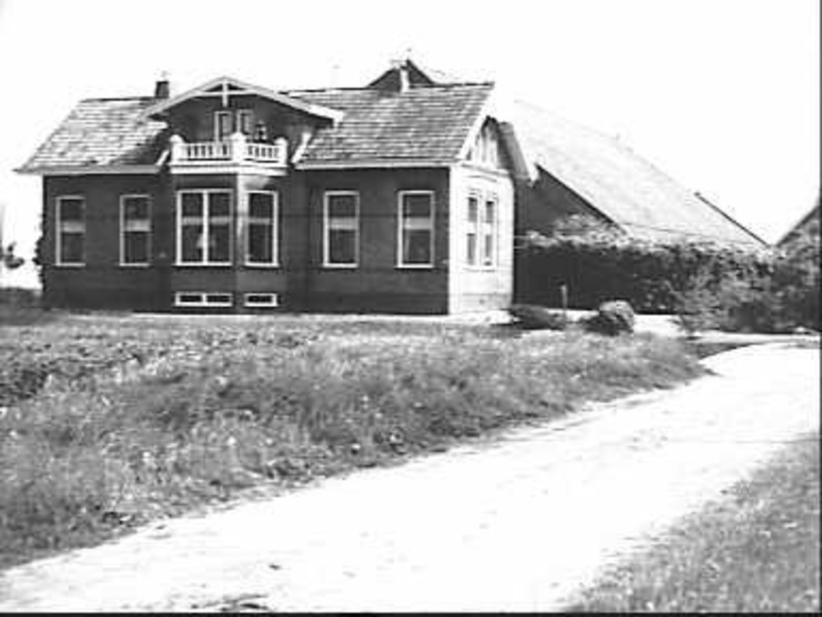 De Olde Stoeve: voor- en zijgevel nr. 32 (opmerking: Deze afbeelding hebben wij helaas alleen in deze lage resolutie.) This is a possible Rijksmonument:Find the monument in the Monuments database:in UnknownAll Rijksmonumenten in UnknownIs this a Rijksmonument?YesNoMore information about this project and help. More images to work at in Category:Possible Rijksmonumenten.